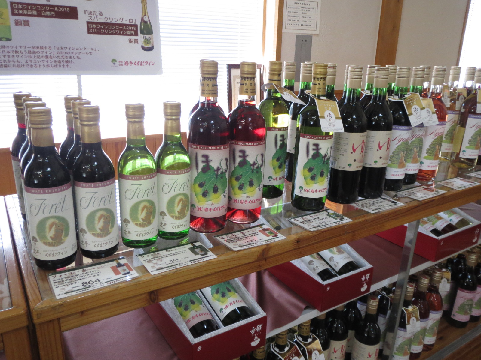 くずまきワインボトル